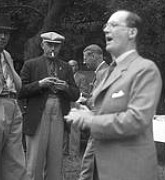 Museimannen Sven T. Kjellberg